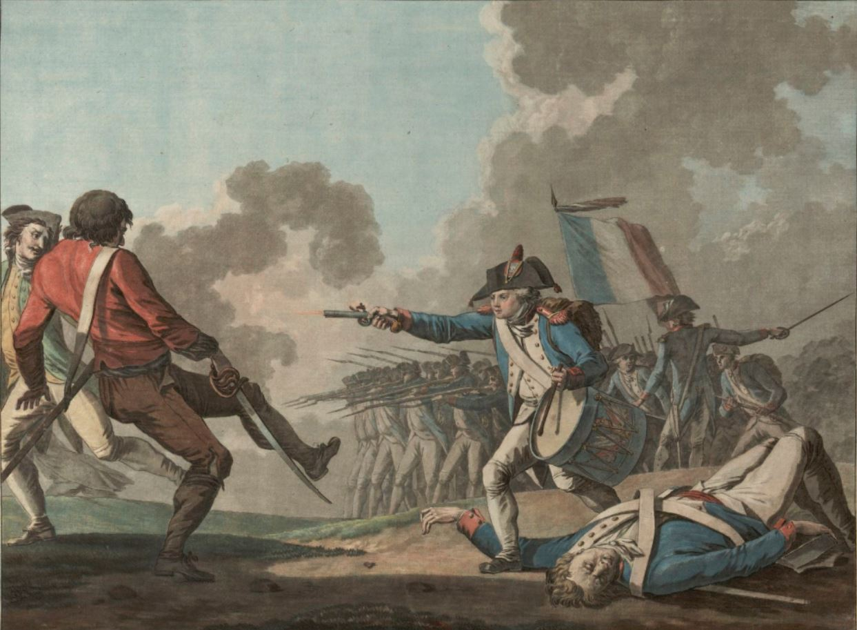 Le tambour Darruder vengeant son père abattu par les Vendéens, bataille de Fougères, novembre 1793.